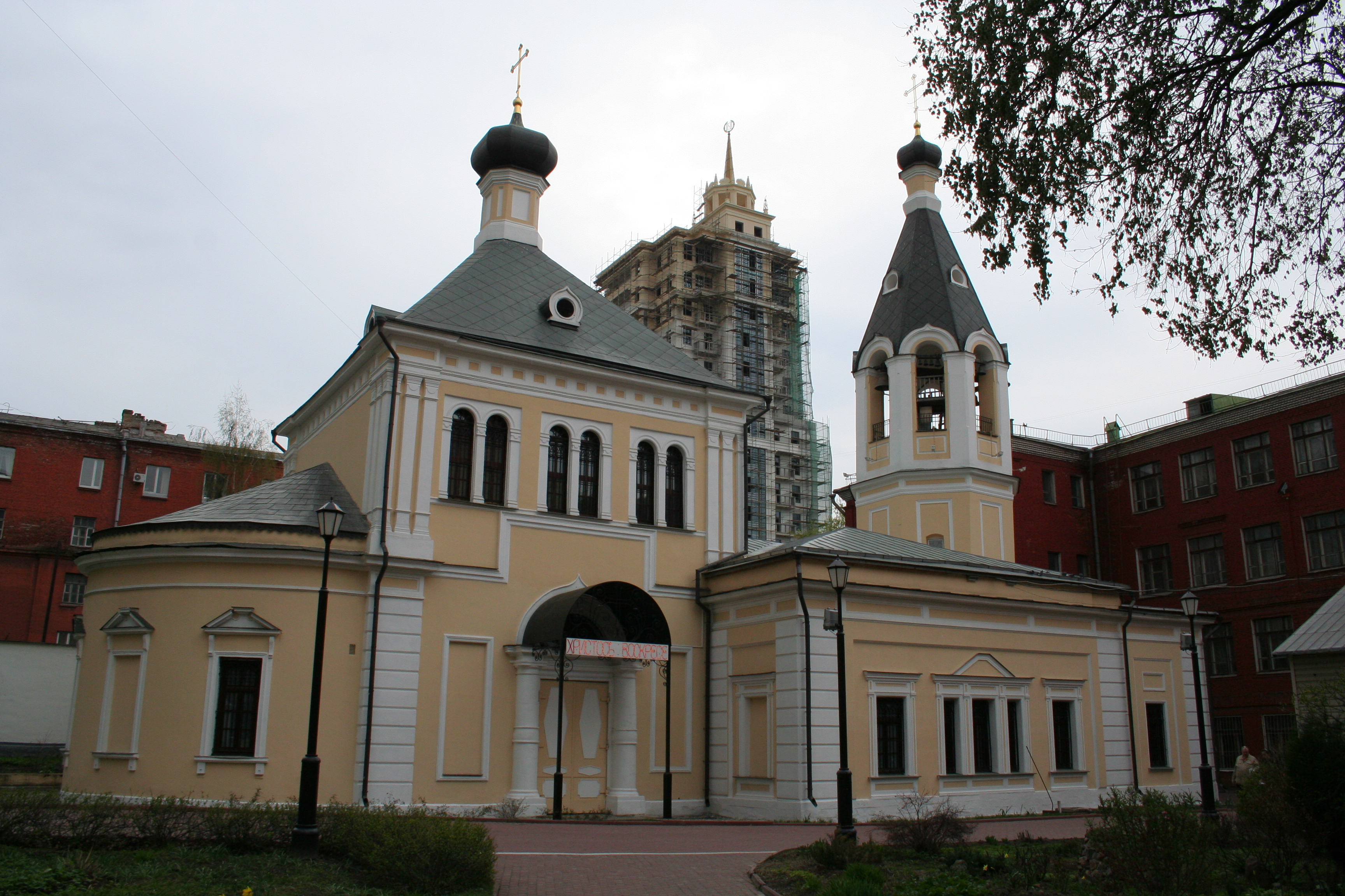 Kirche des ehrwürdigen Eremiten Maron in Moskau